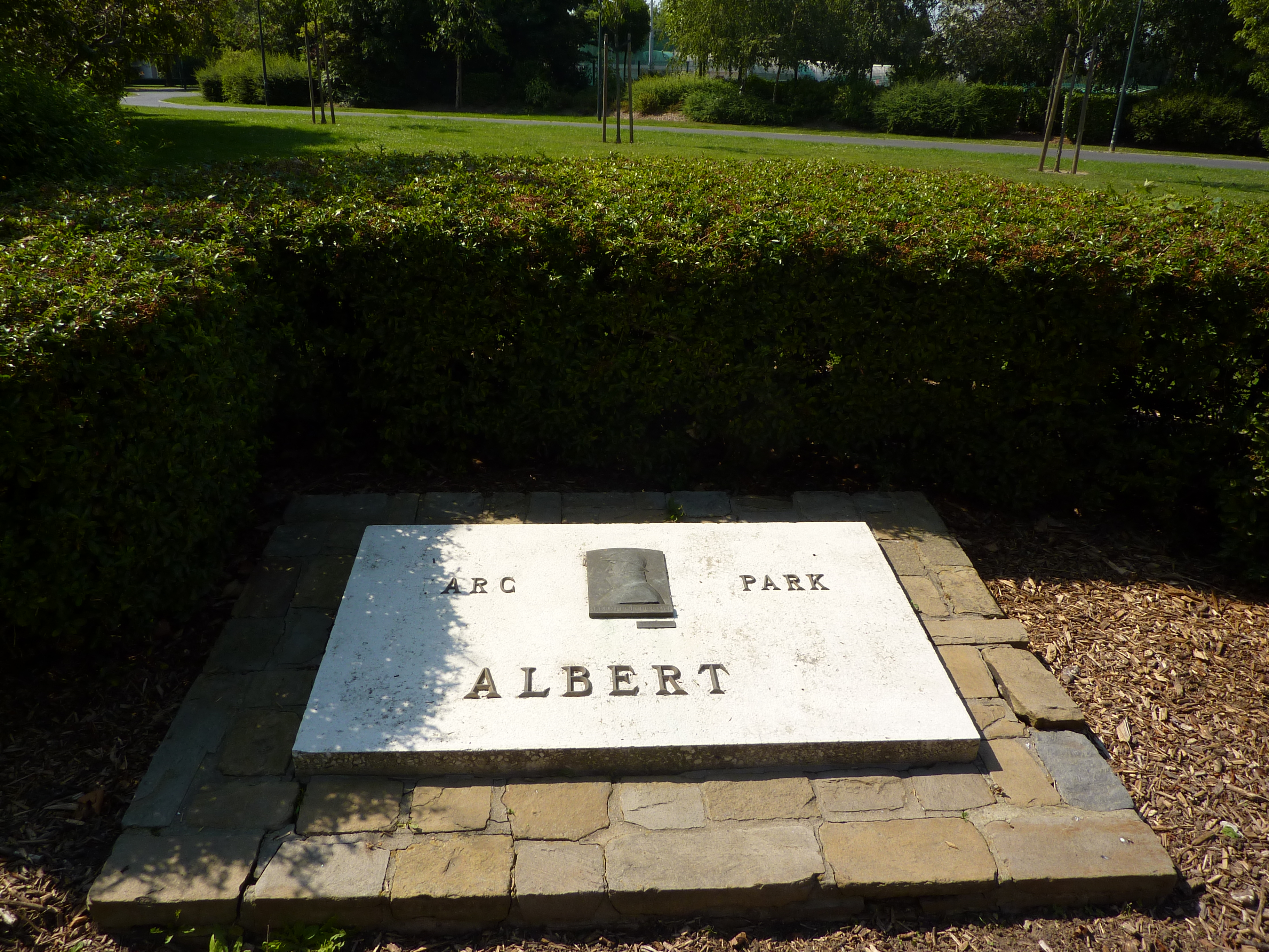 Le parc Alber Ier à Schaerbeek, Bruxelles, Belgique.